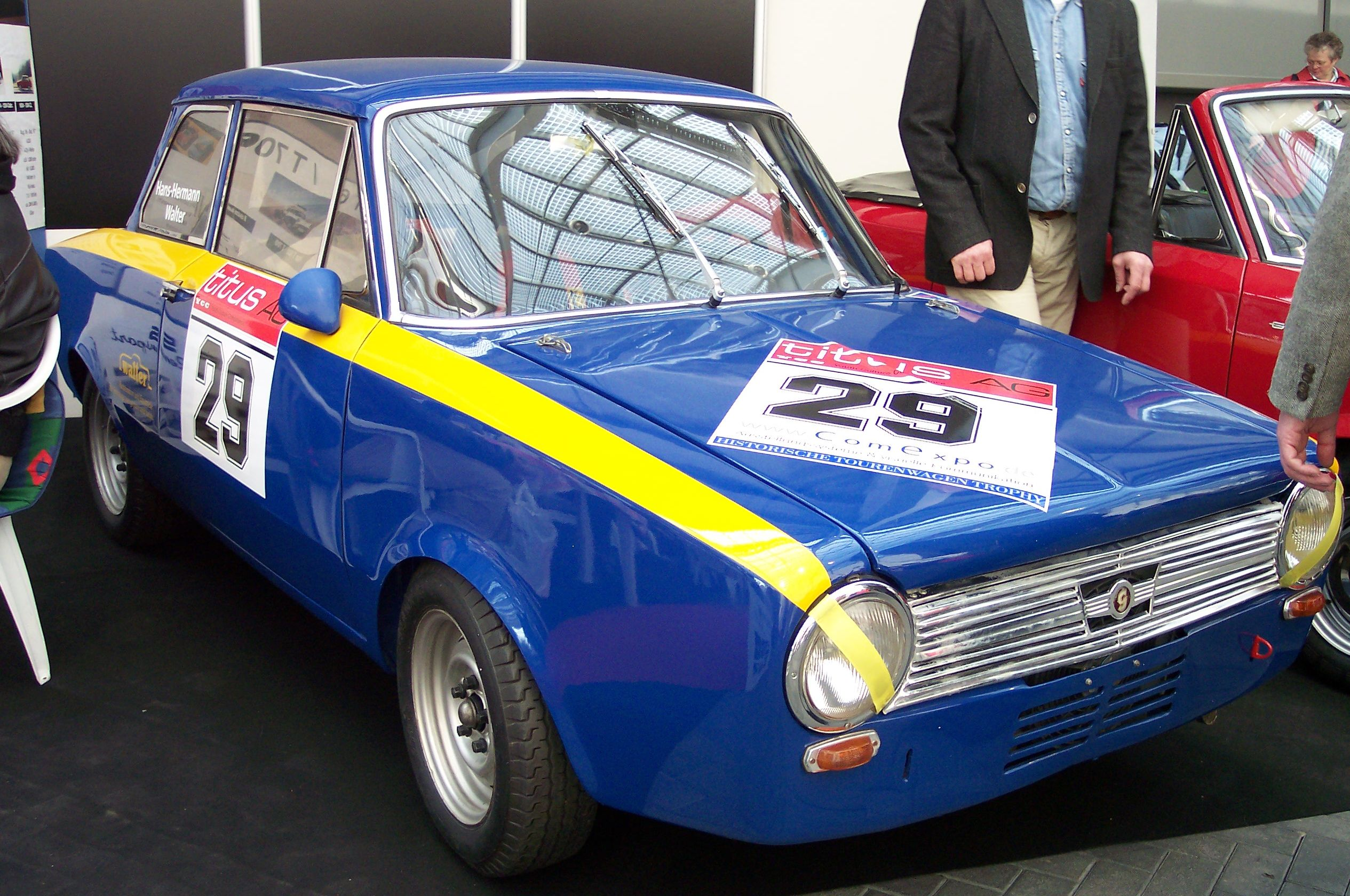 Glas 1204TS racecar 1965